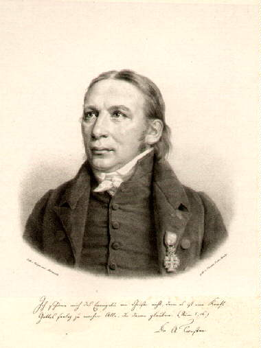 August Detlev Christian Twesten; Lithographie von F.C.Gröger und H.Aldenrath bei Charles Fuchs. Um 1832-1835. 21,5 x 20,5 cm. Vignau-Wilberg L 61.